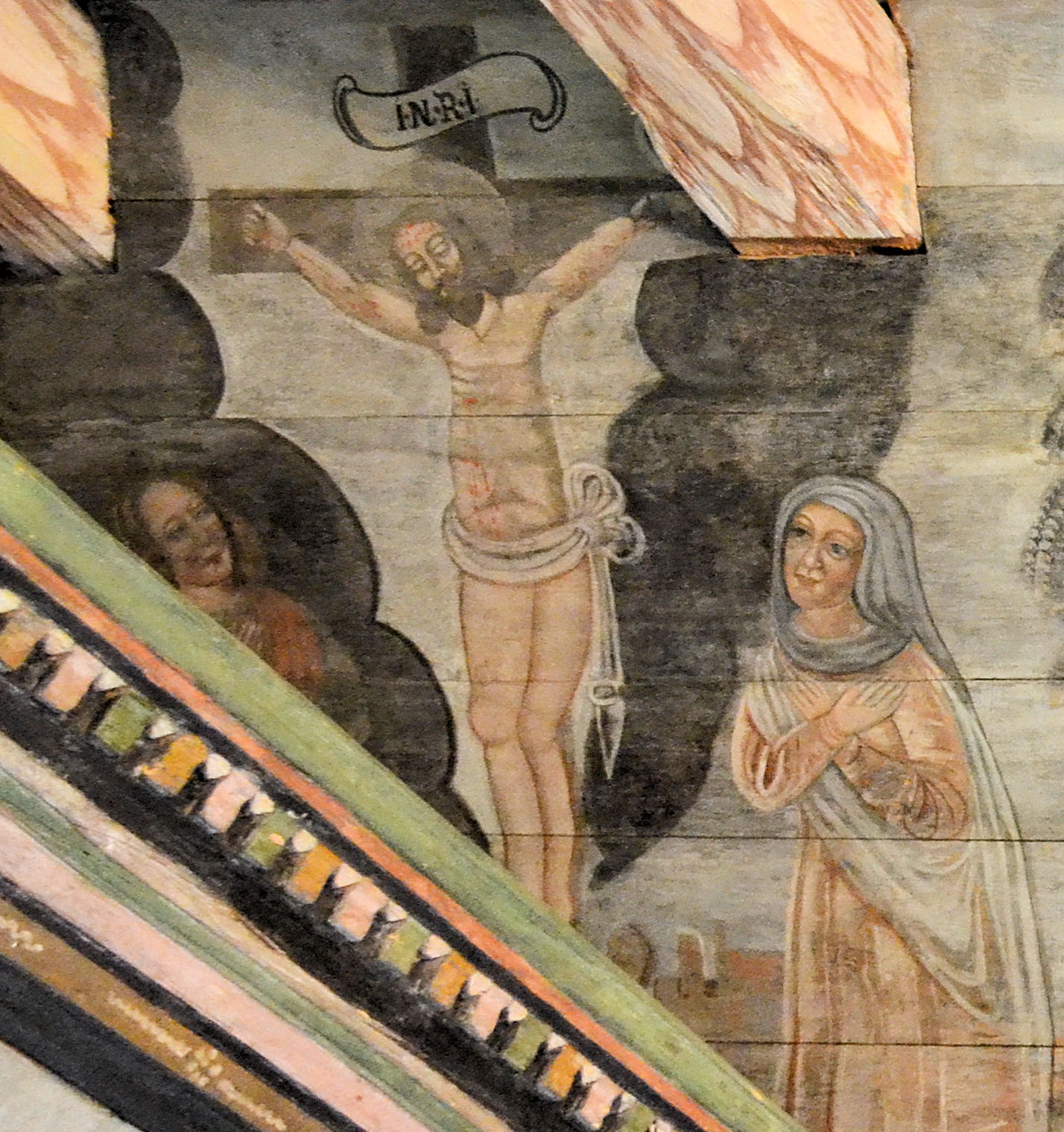 Kościół w Dzisnej (województwo zachodniopomorskie)